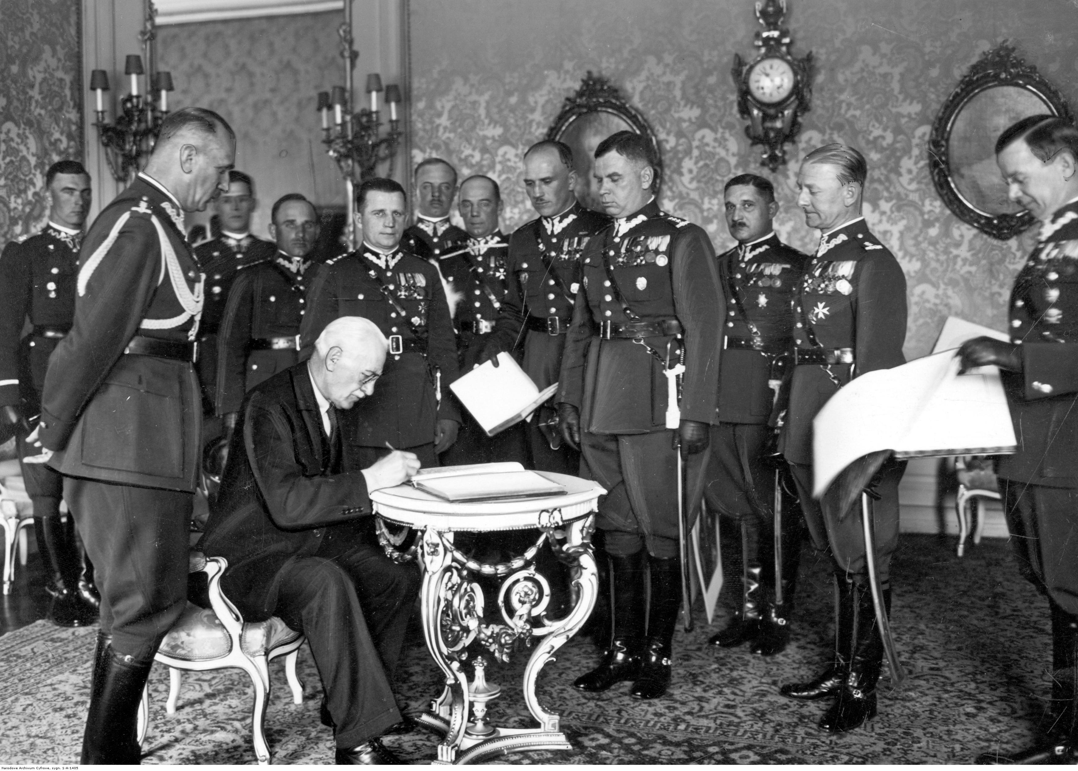 Delegacja 15 Dywizji Piechoty z Bydgoszczy u prezydenta RP Ignacego Mościckiego. Widoczni m.in. mjr Stanisław Sulma (trzeci z prawej), płk Mirkułowski, płk Jan Korkozowicz, płk Władysław Powierza (drugi z prawej), płk Wojciech Stachowicz, mjr Berk, płk Bolesław Schwarzenberg-Czerny (szósty z prawej). Koncern Ilustrowany Kurier Codzienny - Archiwum Ilustracji. Sygnatura: 1-A-1405